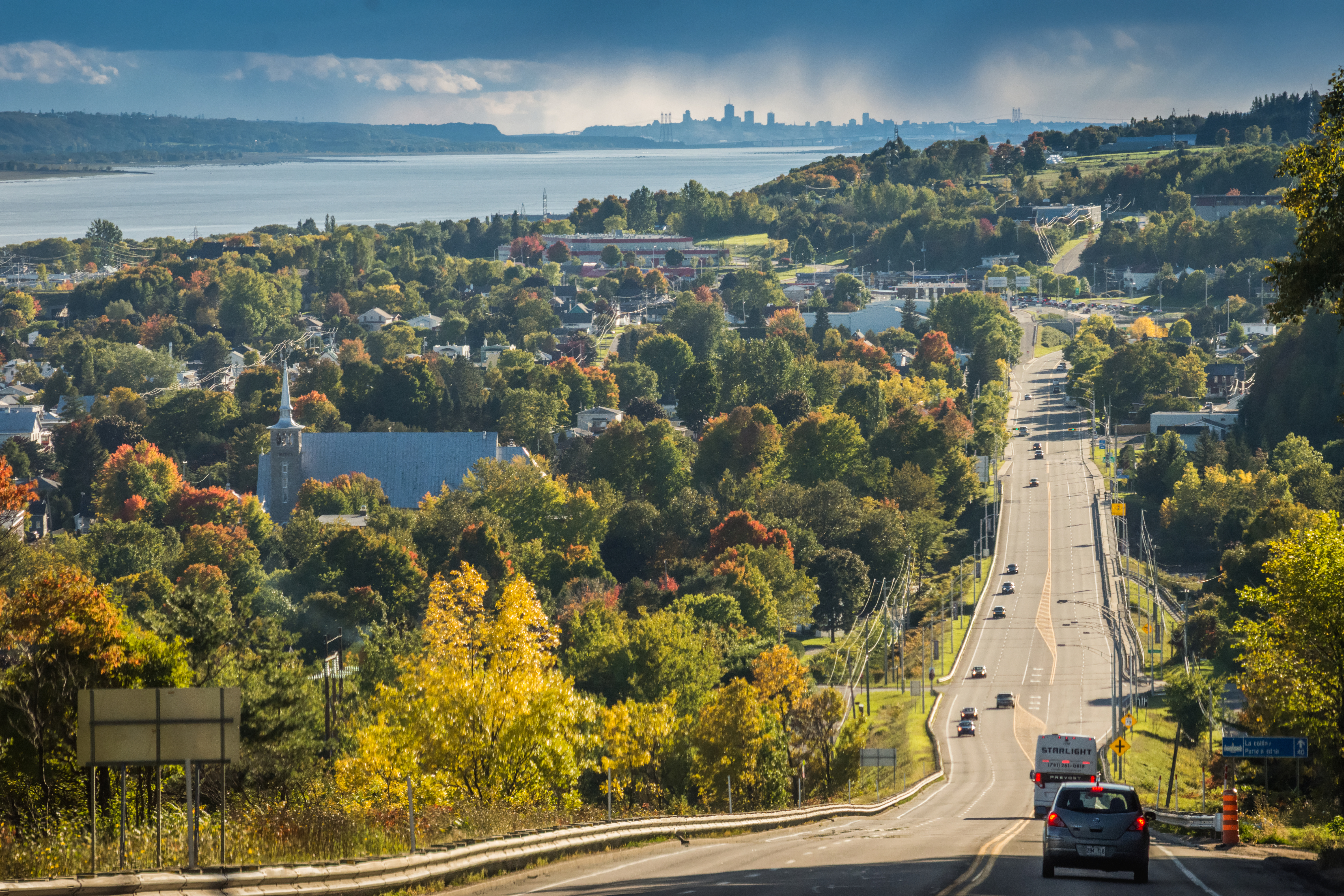 Vue du haut de la côte de Beaupré (route 138). La ville de Beaupré est en avant plant, par la suite, la ville de Saint-Anne-de-Beaupré, puis en arrière plan, les grattes-ciels de la ville de Québec